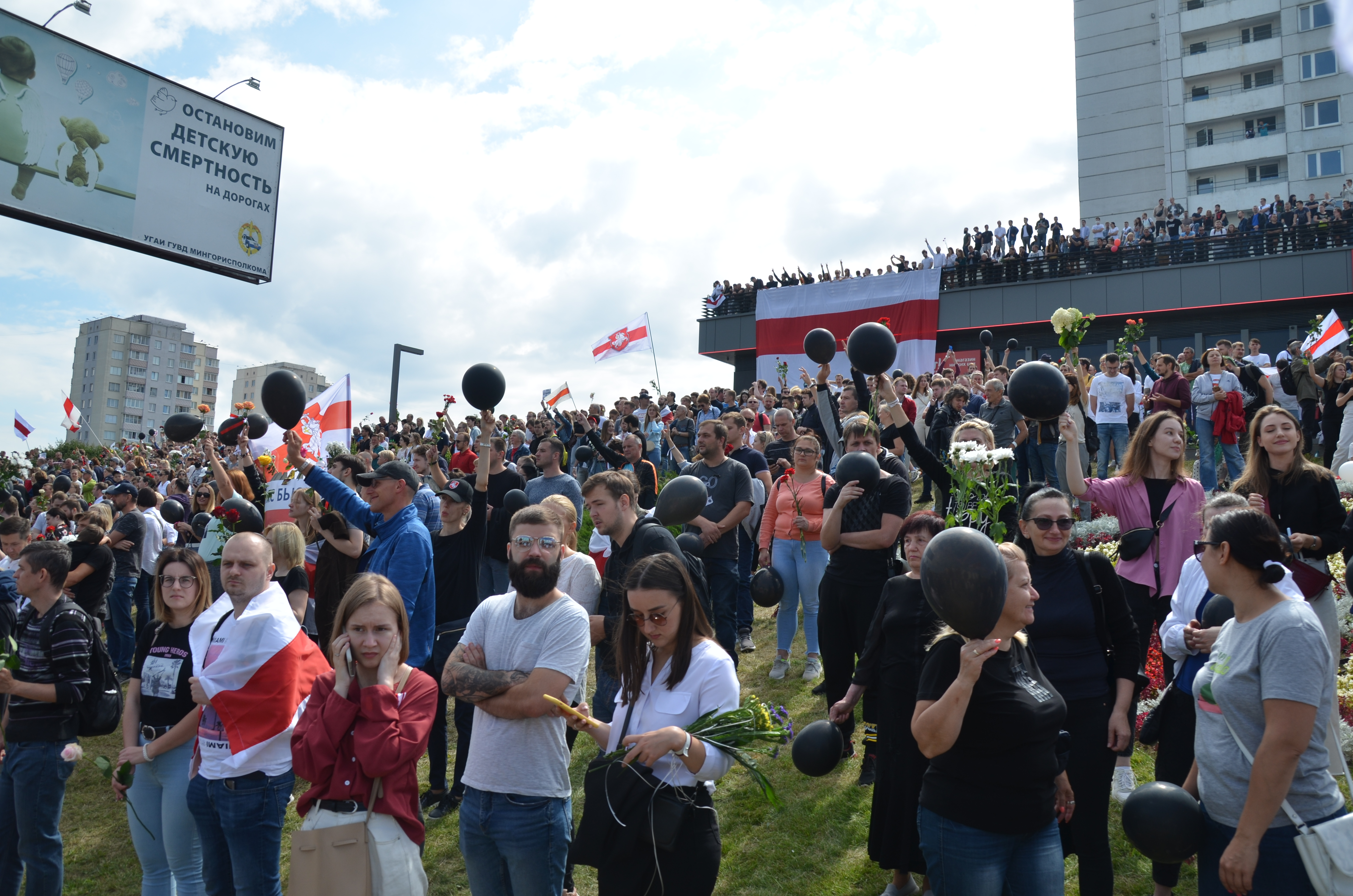 Митинг памяти Александра Тарайковского, метро Пушкинская, Минск, 15 августа 2020